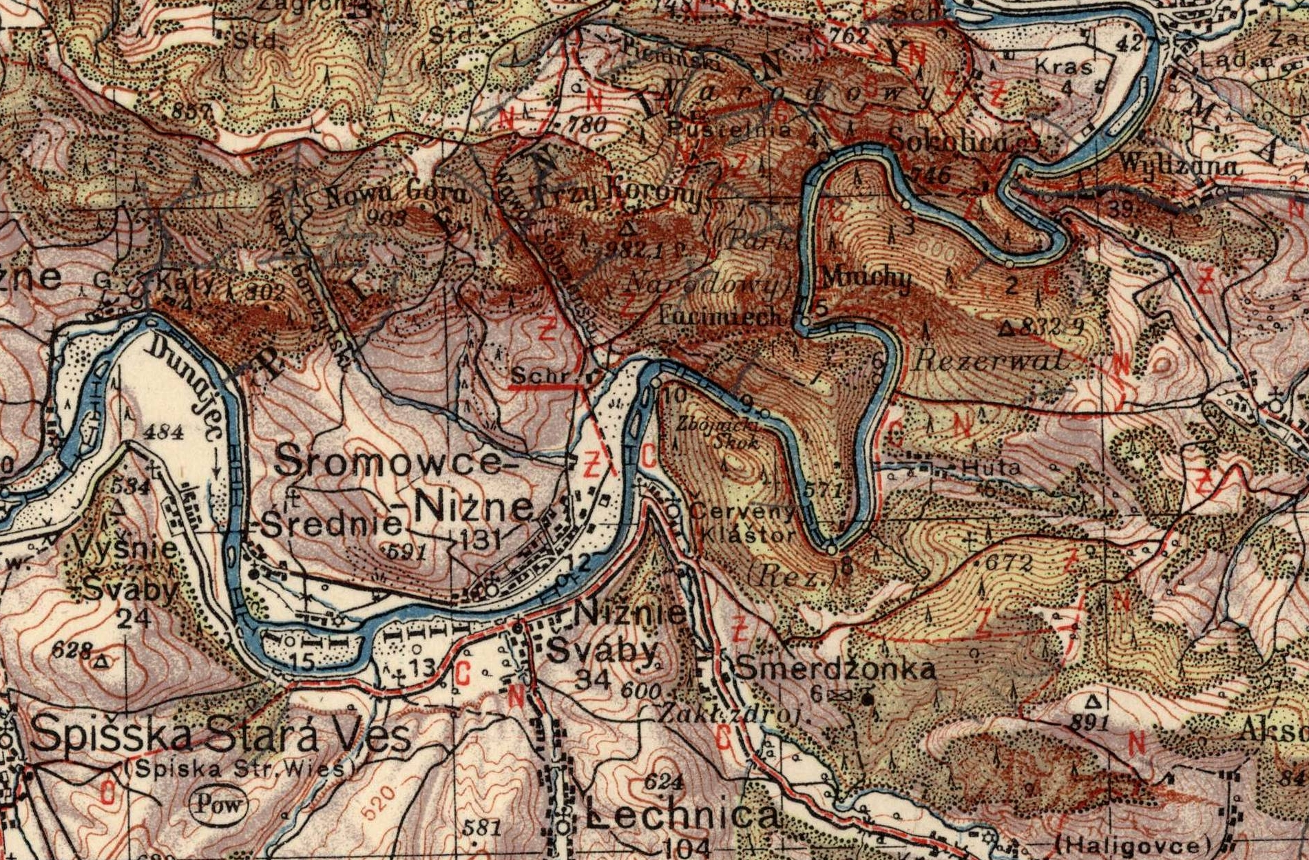 Czerwony Klasztor - Červený Kláštor - Rotes Kloster. Fragment mapy WIG z 1936